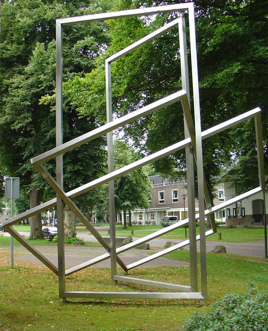 "Zilveren bloem" standbeeld op de Brink van Gieten, beeldhouwer Carlo Kroon